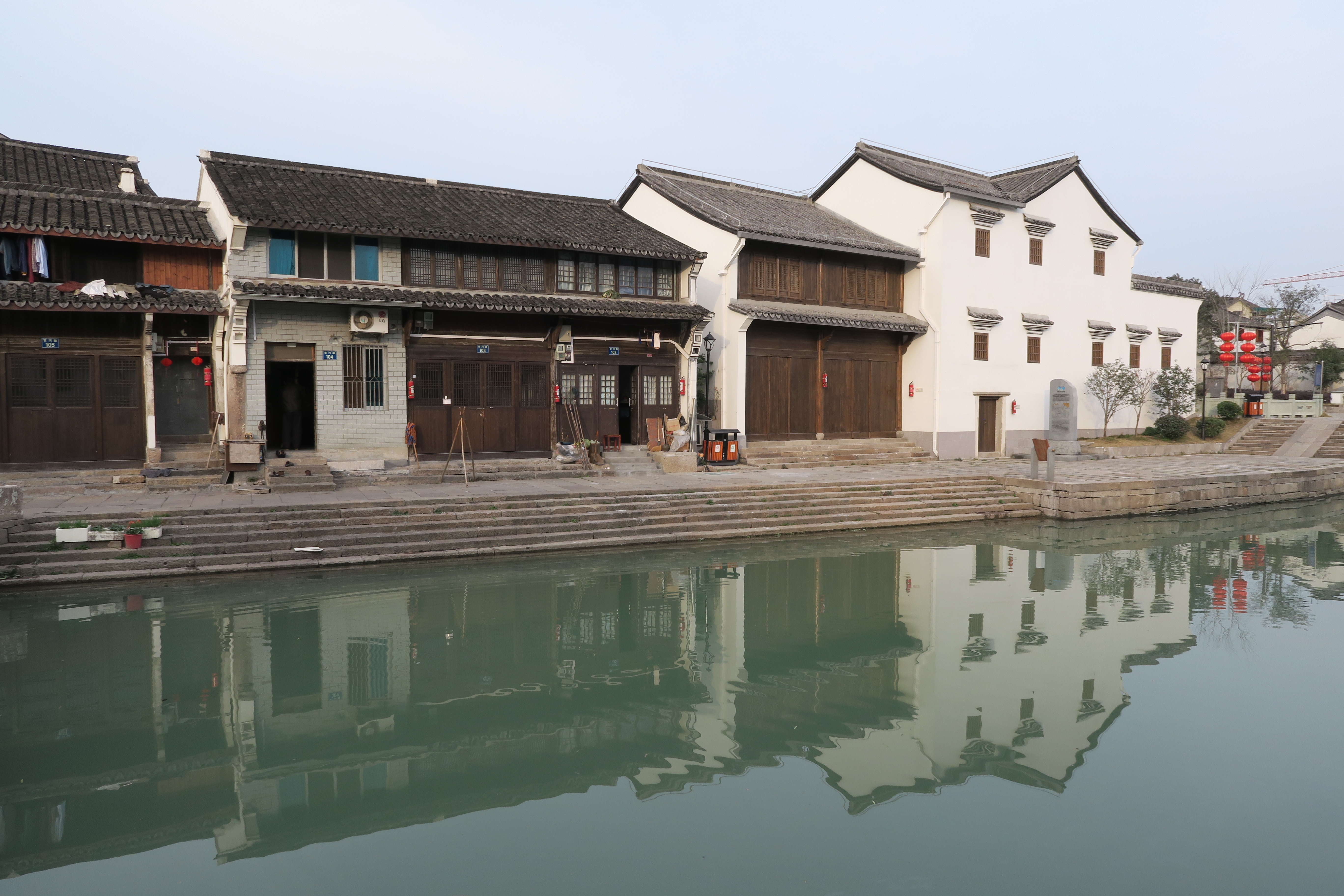 过塘行码头，2015-02-14